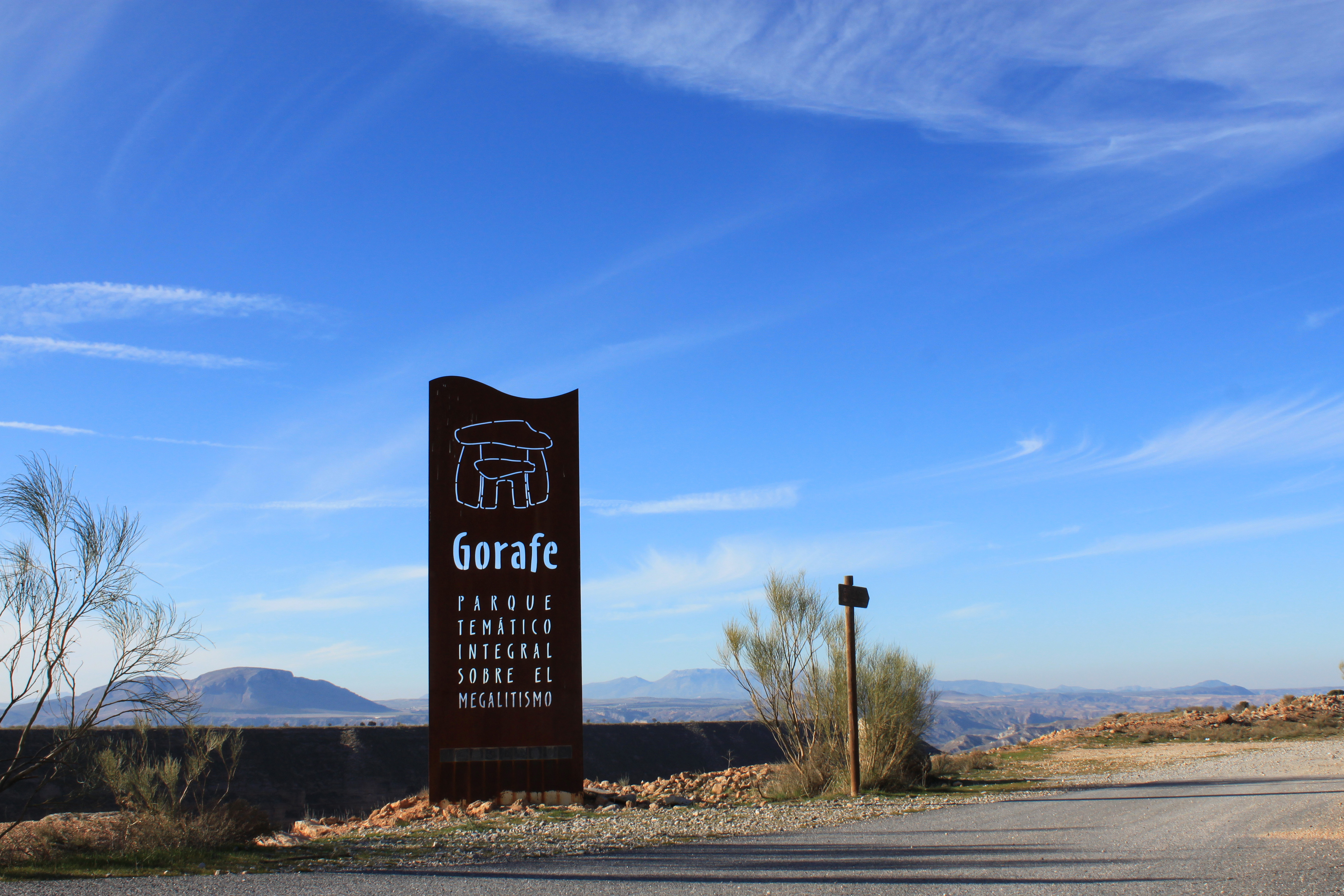 Parque Megalítico de Gorafe, Llano de Olivares. Gorafe, provincia de Granada, Andalucía, España.